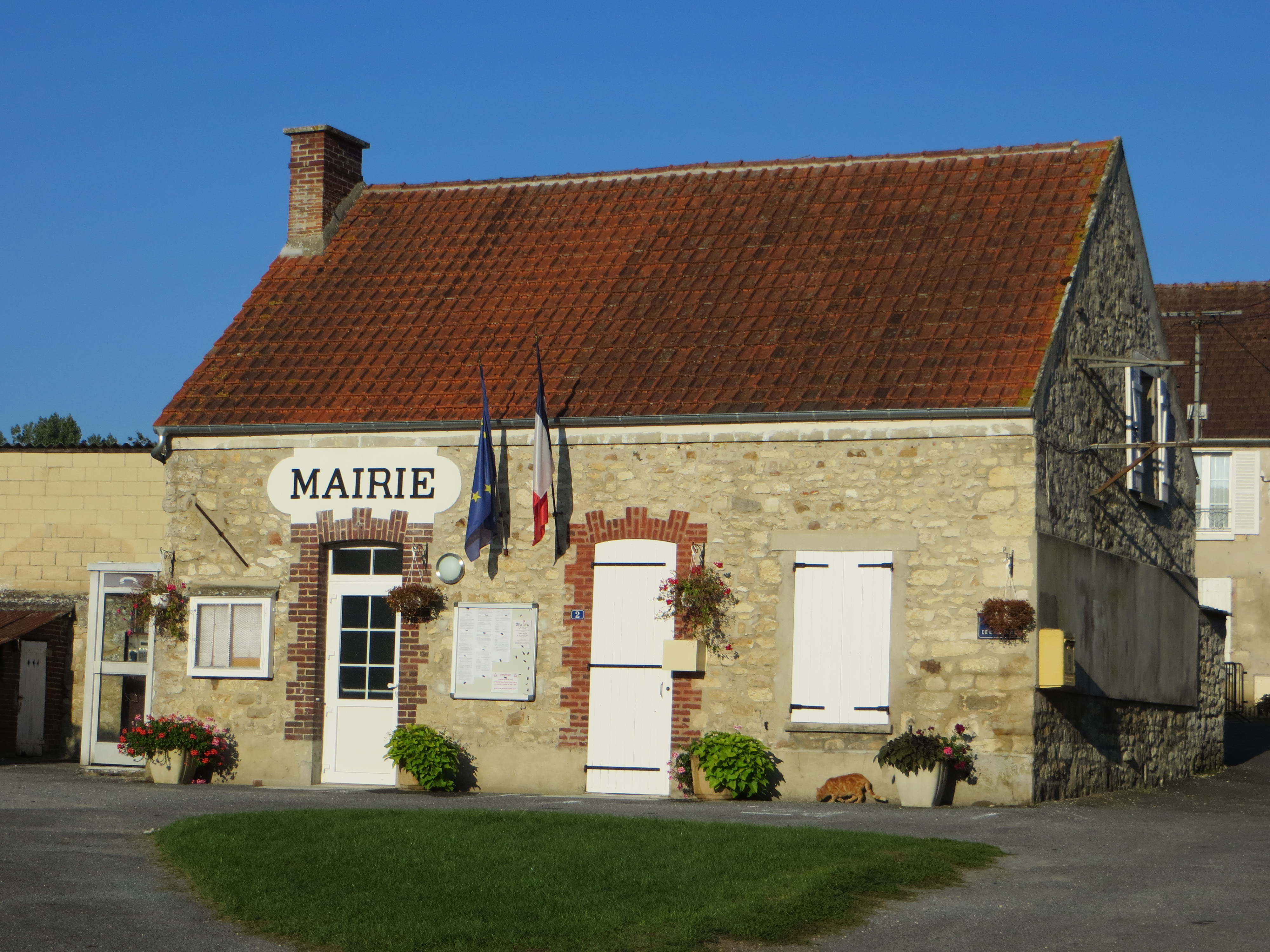 Vue de la mairie